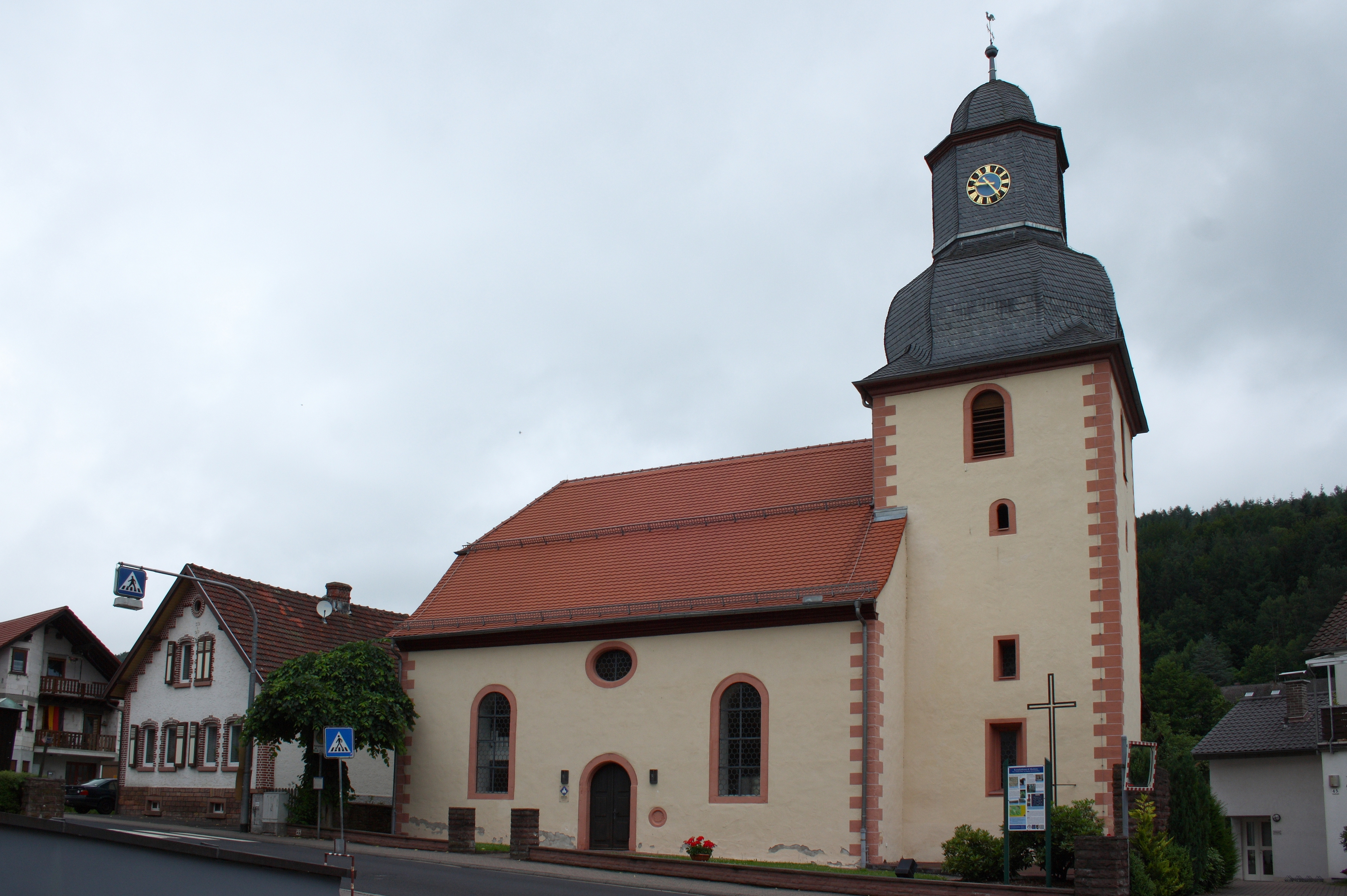 Evangelische Kirche, ehemals St. Marien, in Kempfenbrunn, einem Ortsteil von Flörsbachtal im Main-Kinzig-Kreis (Hessen)